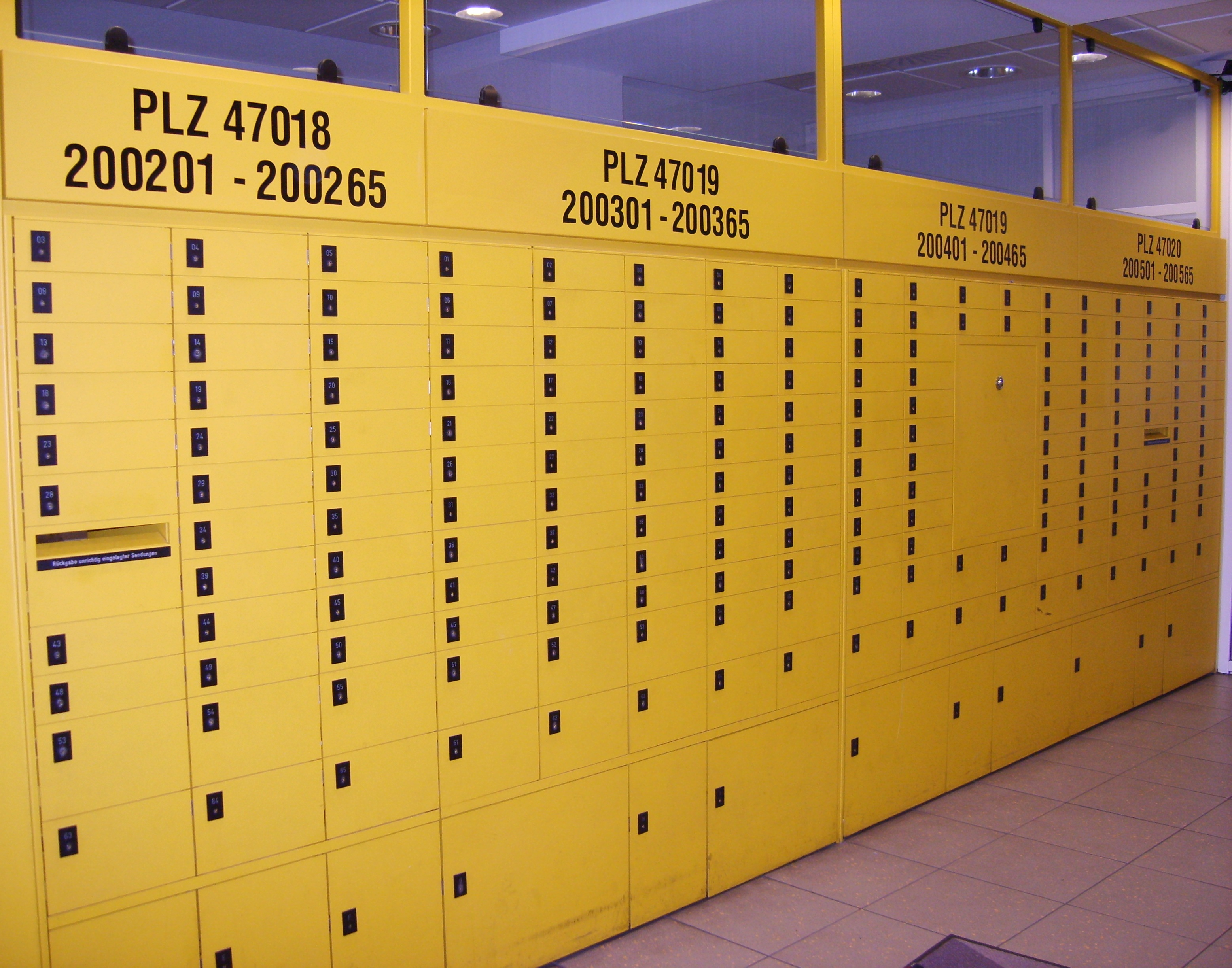 Postfachschränke im Duisburger Postamt Sonnenwall